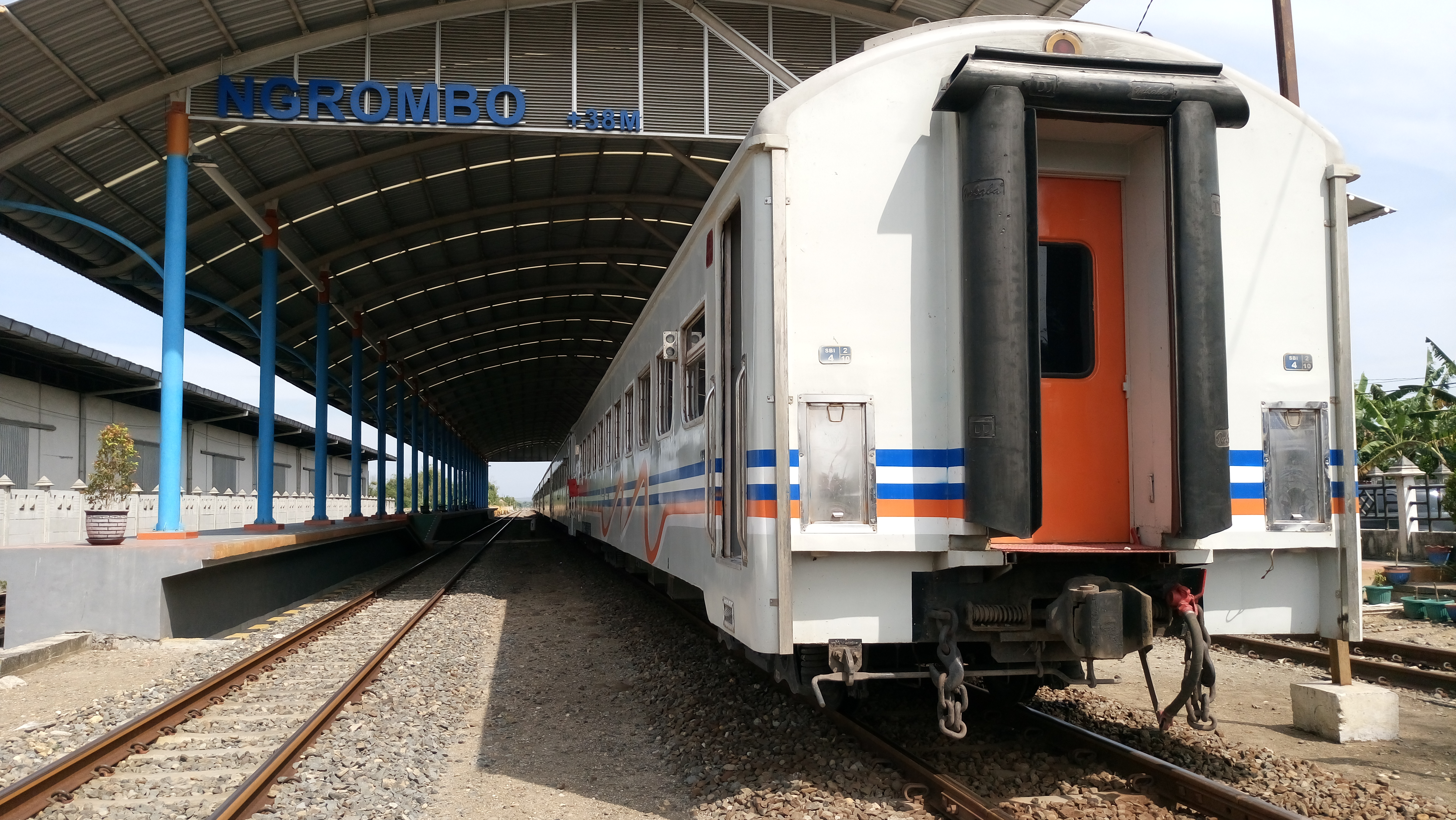 Basa Jawa: Kereta api Maharani sedang berhenti di peron Stasiun Ngrombo